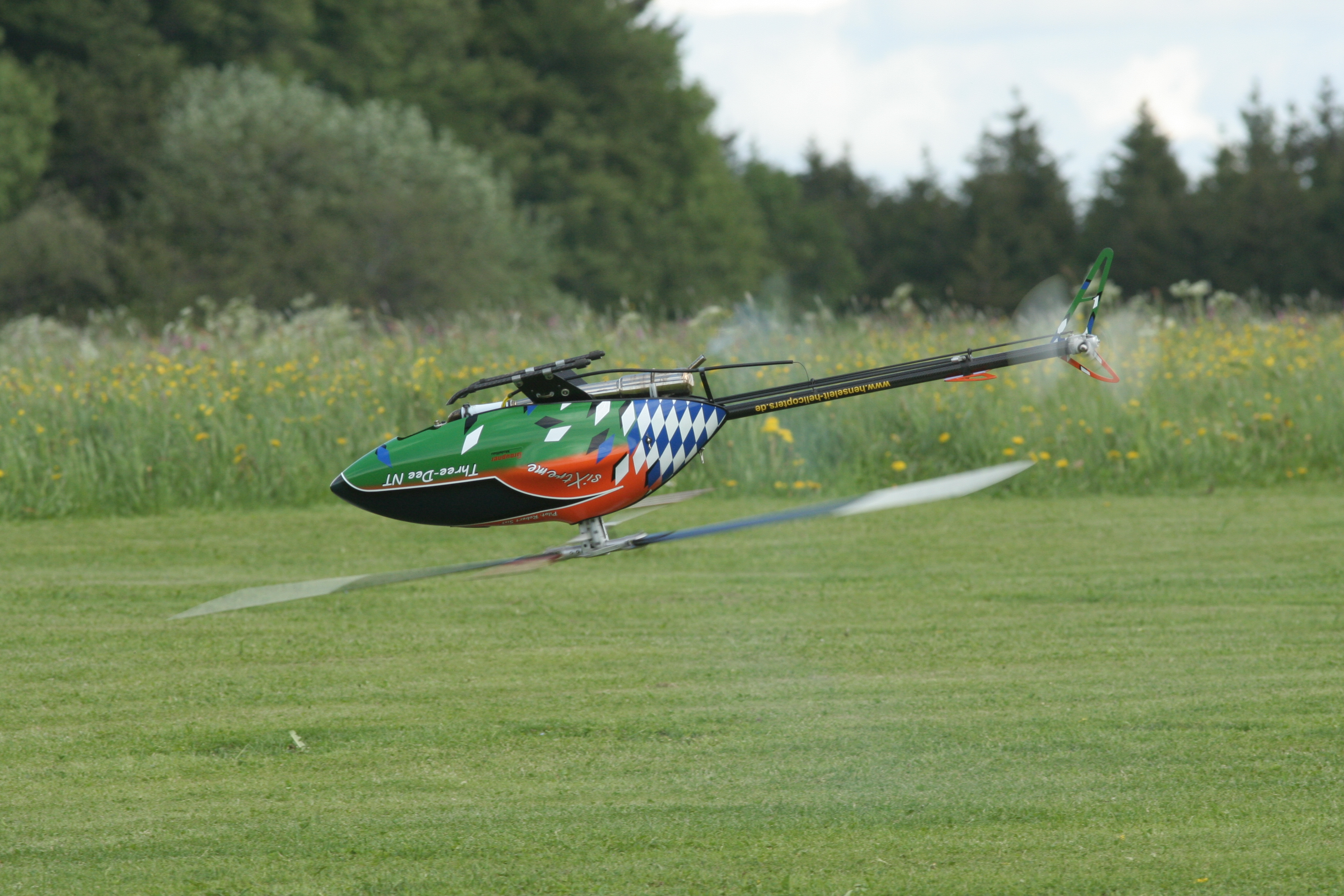 Kunstflug RC-Modellhubschrauber Three Dee NT